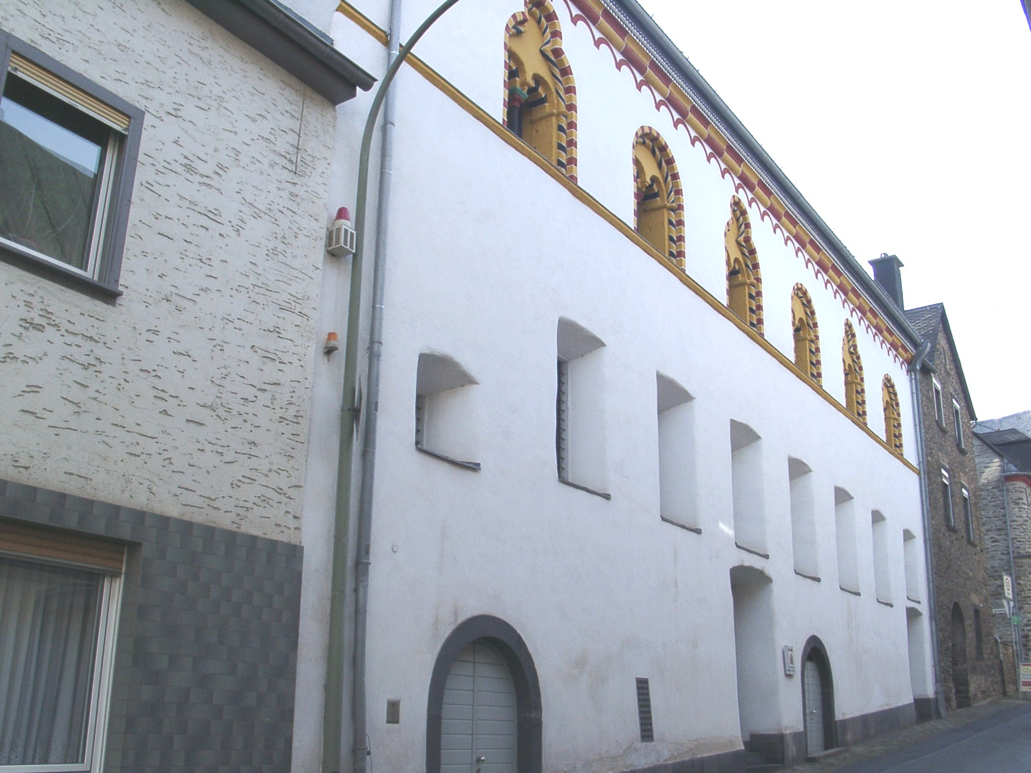 Karden Zehnthaus - selbst fotografiert (Klaus Graf) 30.4.2005